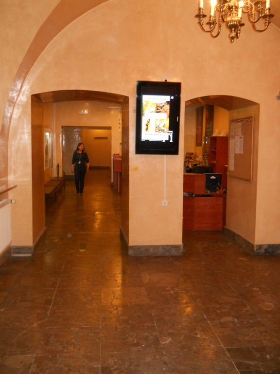 Poznań, ul. Wodna 27 - Pałac Górków, obecnie Muzeum Archeologiczne (hol w muzeum)